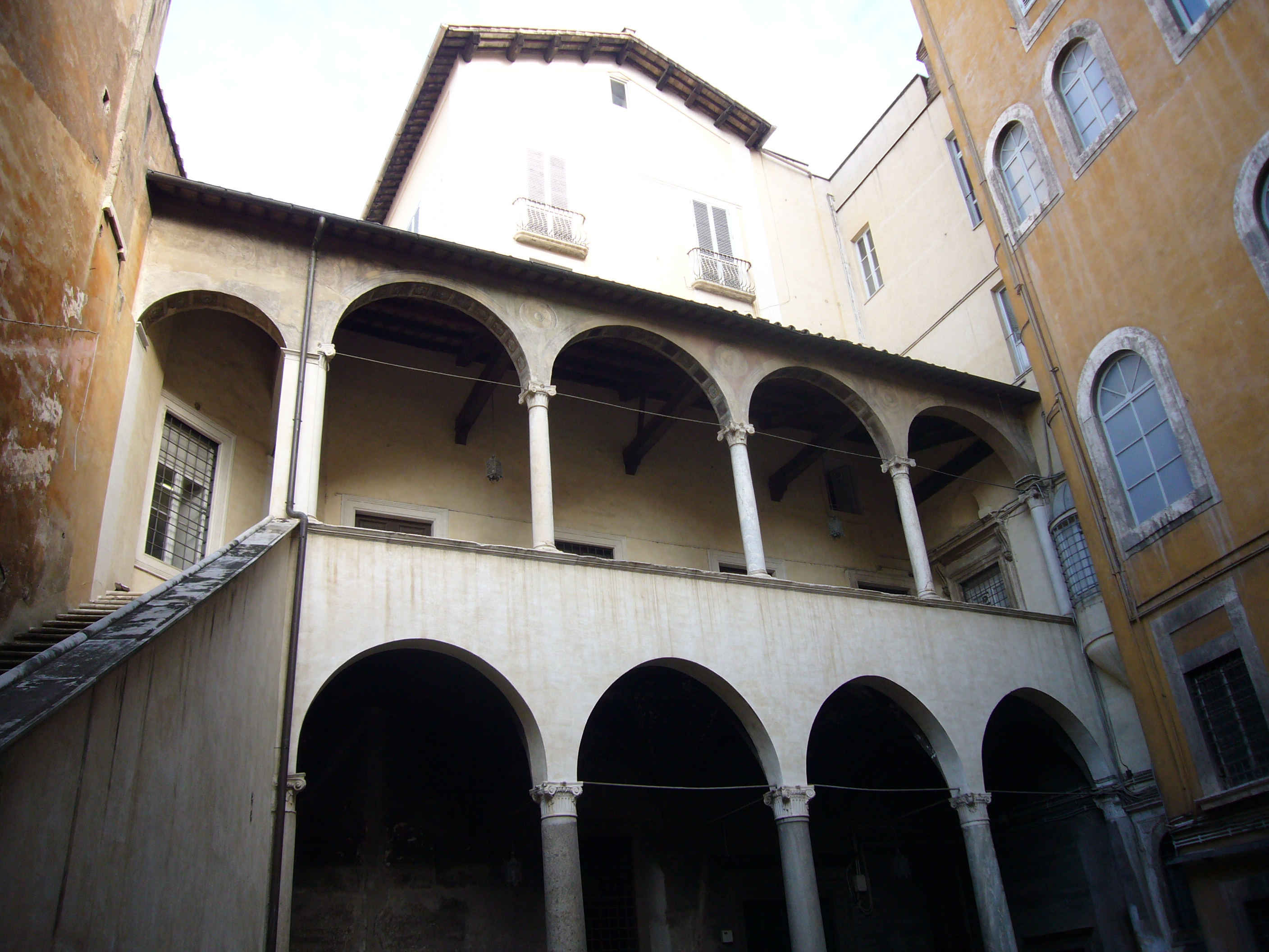 Roma, palazzetto Mattei a S. Angelo. Cortile.